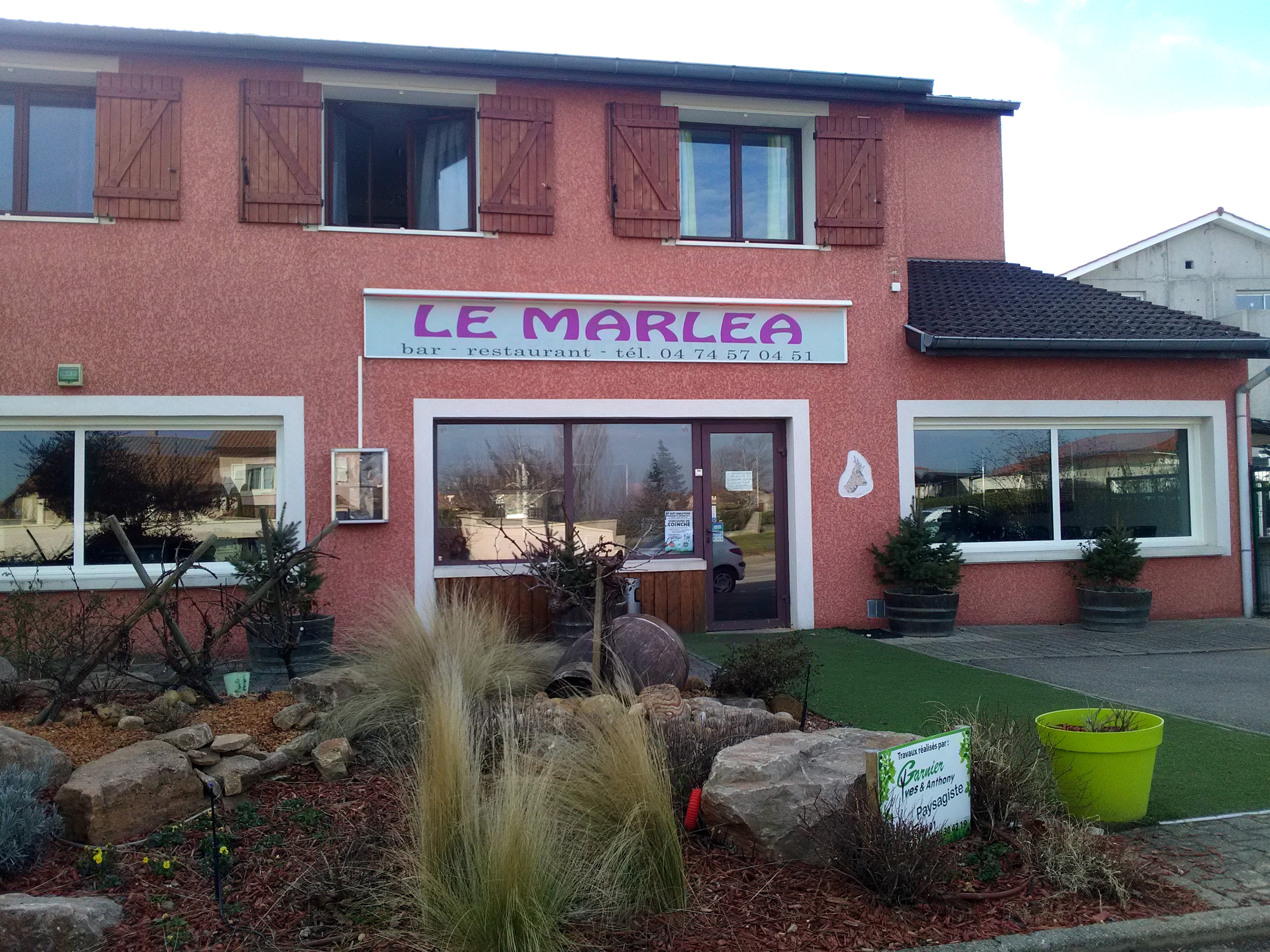 Restaurant de notre village